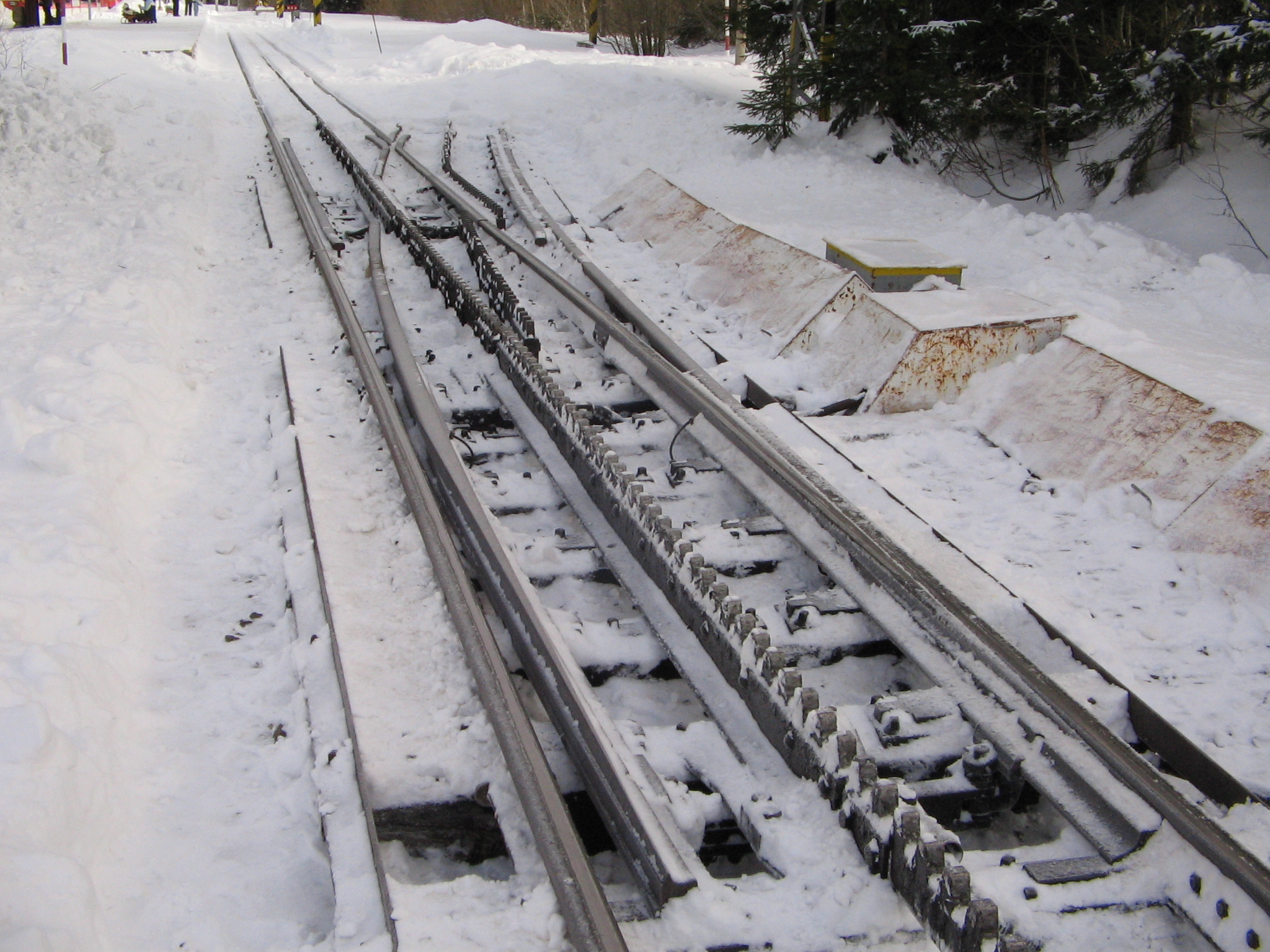 Denta trakforko sur mallarĝtraka fervojo en Štrbské Pleso en Slovakio